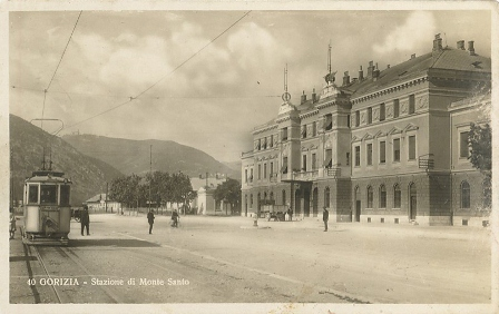 Gorizia - Piazzale Transalpina